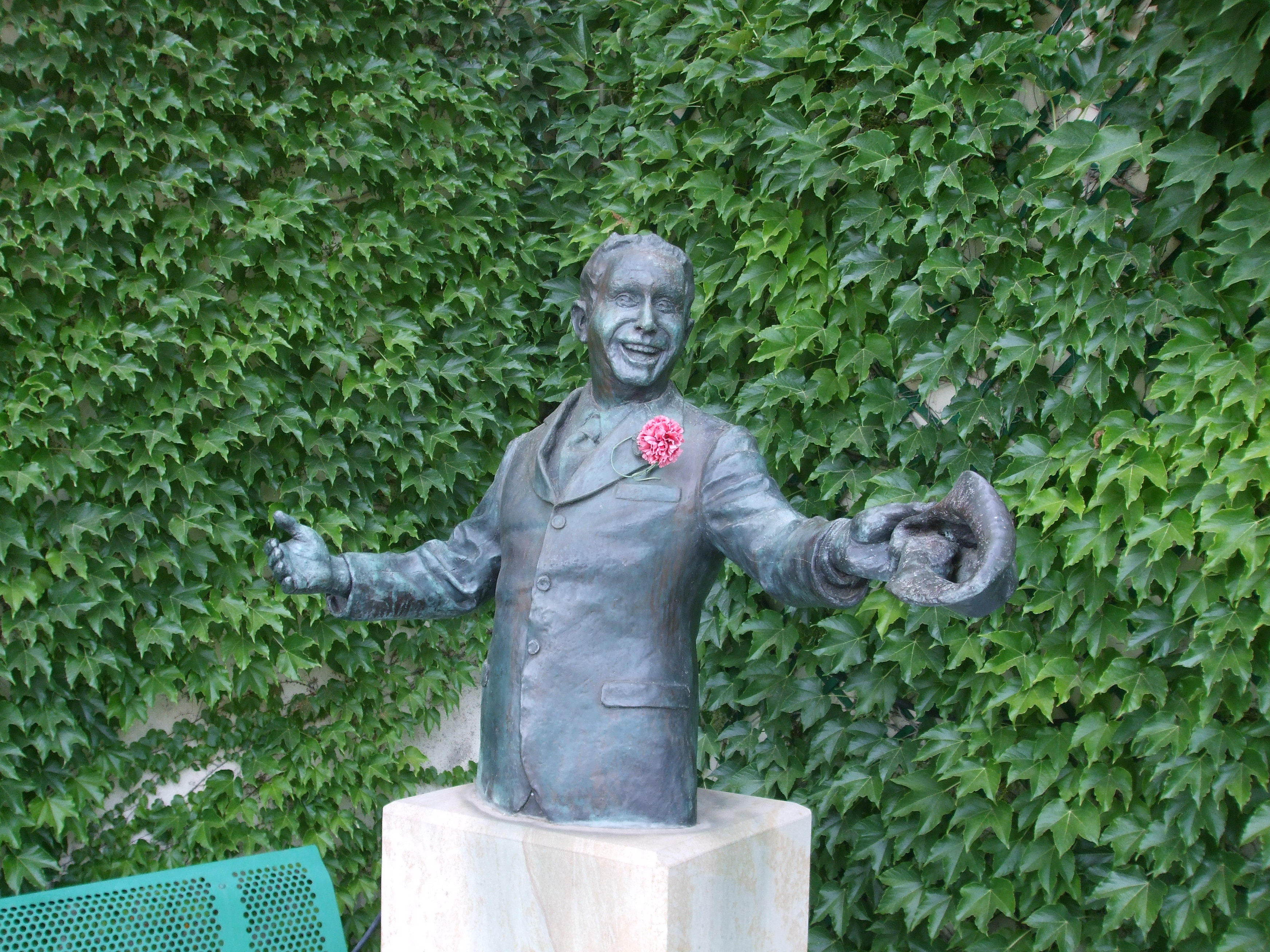 statue de Charles Trénet près de sa maison natale à Narbonne